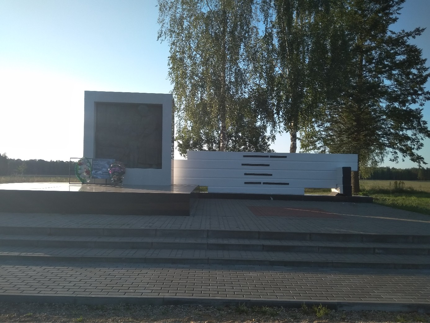 Барельеф, мемориальный комплекс Литавец